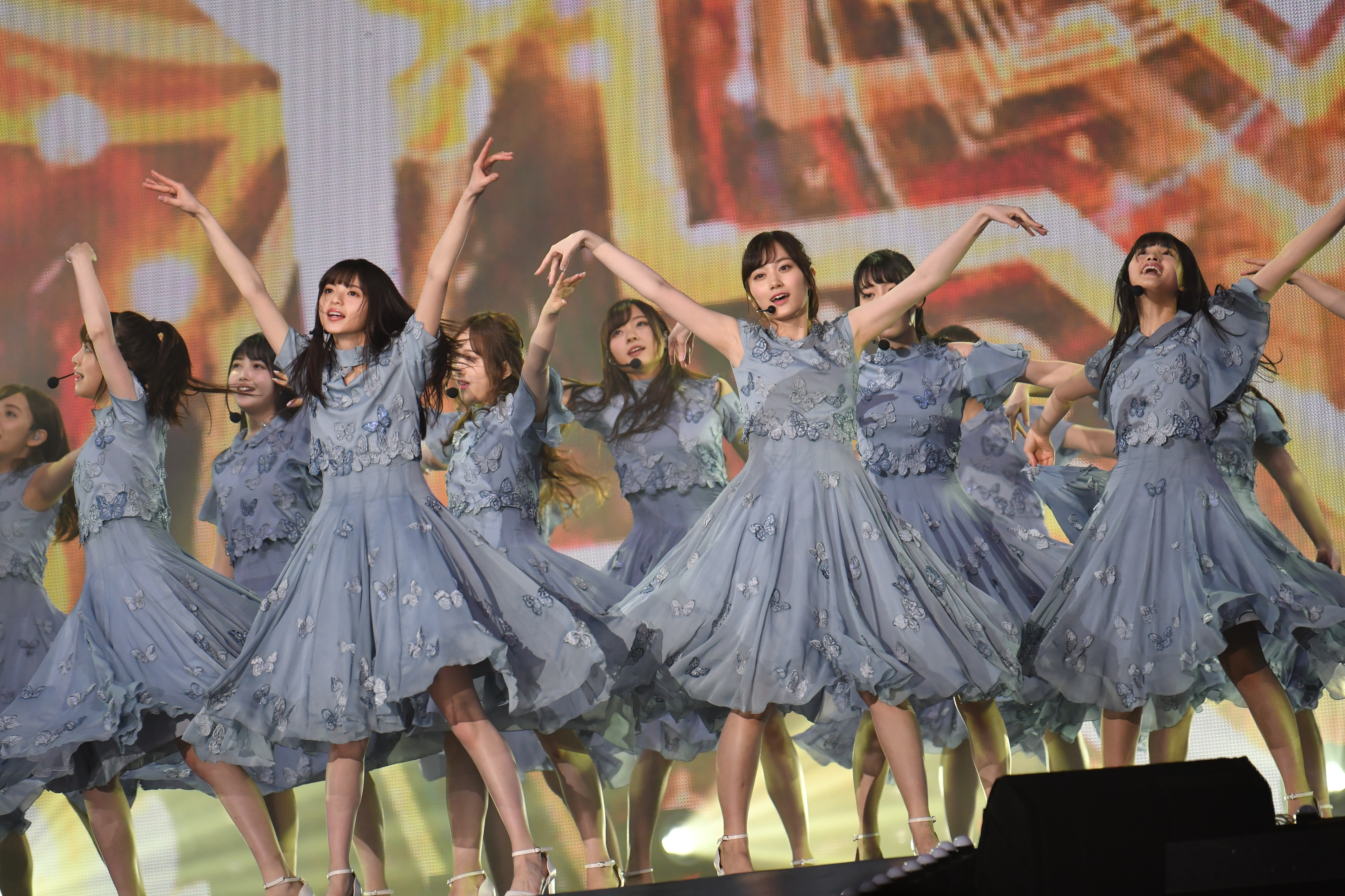 2019.01.26「第14回 KKBOX MUSIC AWARDS in Taiwan」乃木坂46 @台北小巨蛋